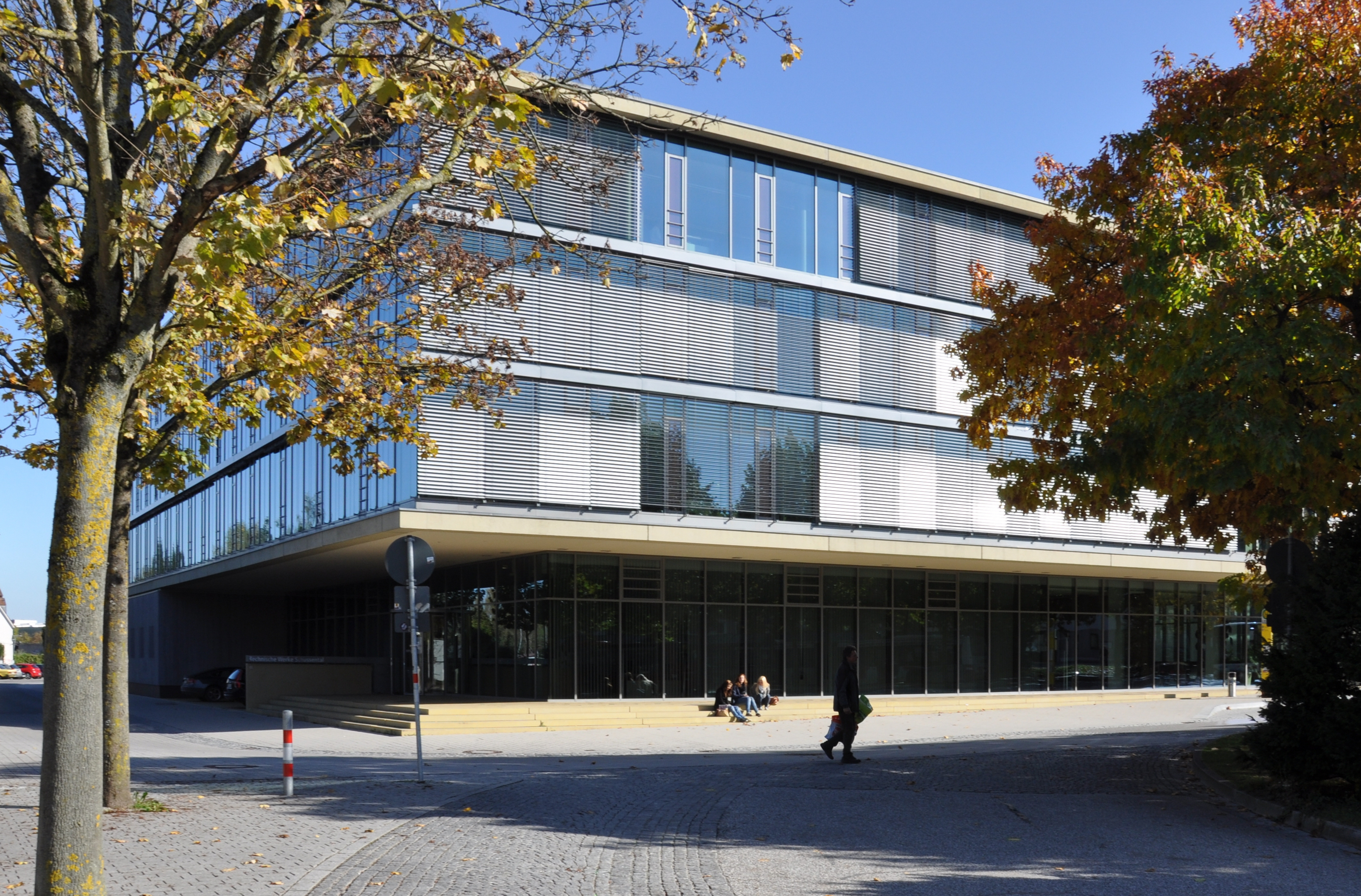 Ravensburg, Technische Werke Schussental (tws), Verwaltungsgebäude am Bahnhof